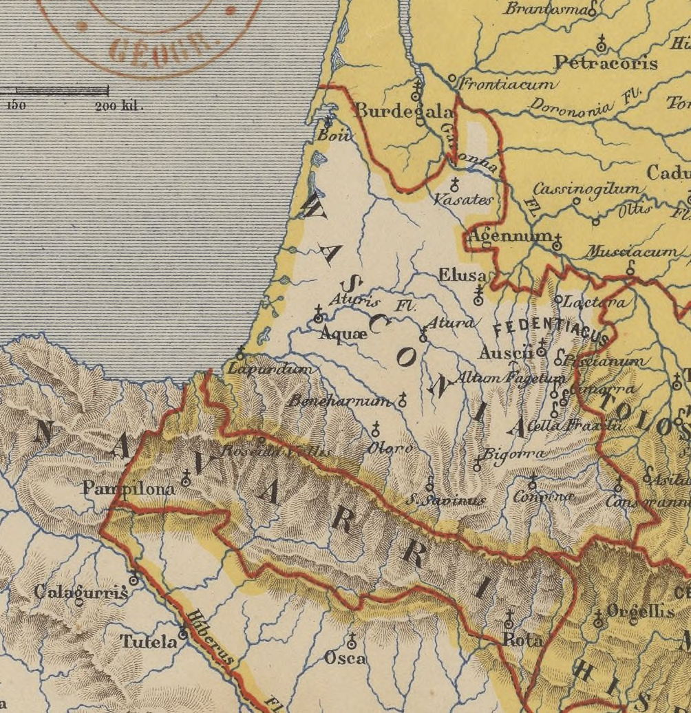 1876ean marraztu duen Longnonen mapan, Wasconiako lurraldea ikus dezake.